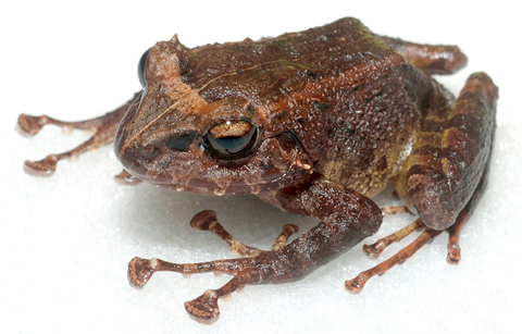 Platymantis rabori